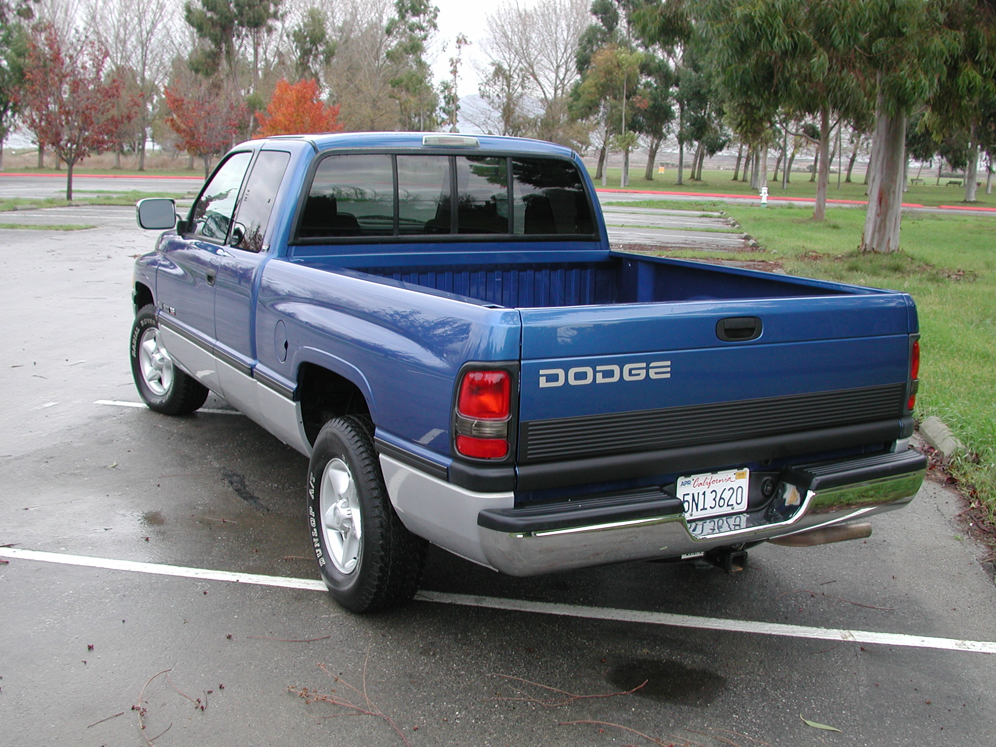 truck06